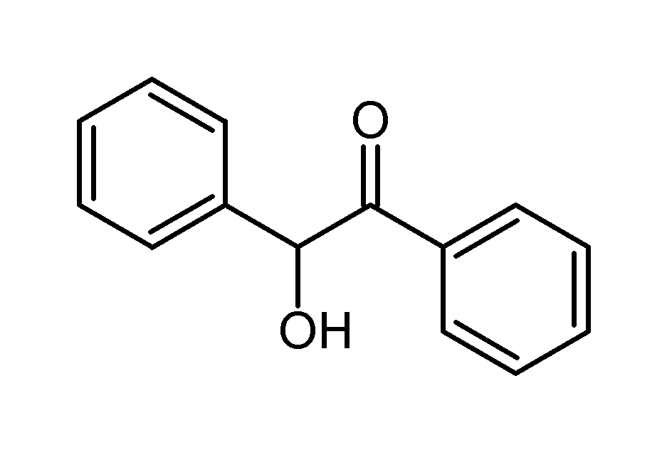 安息香分子结构式，自绘 Benzoin Structure, self-made